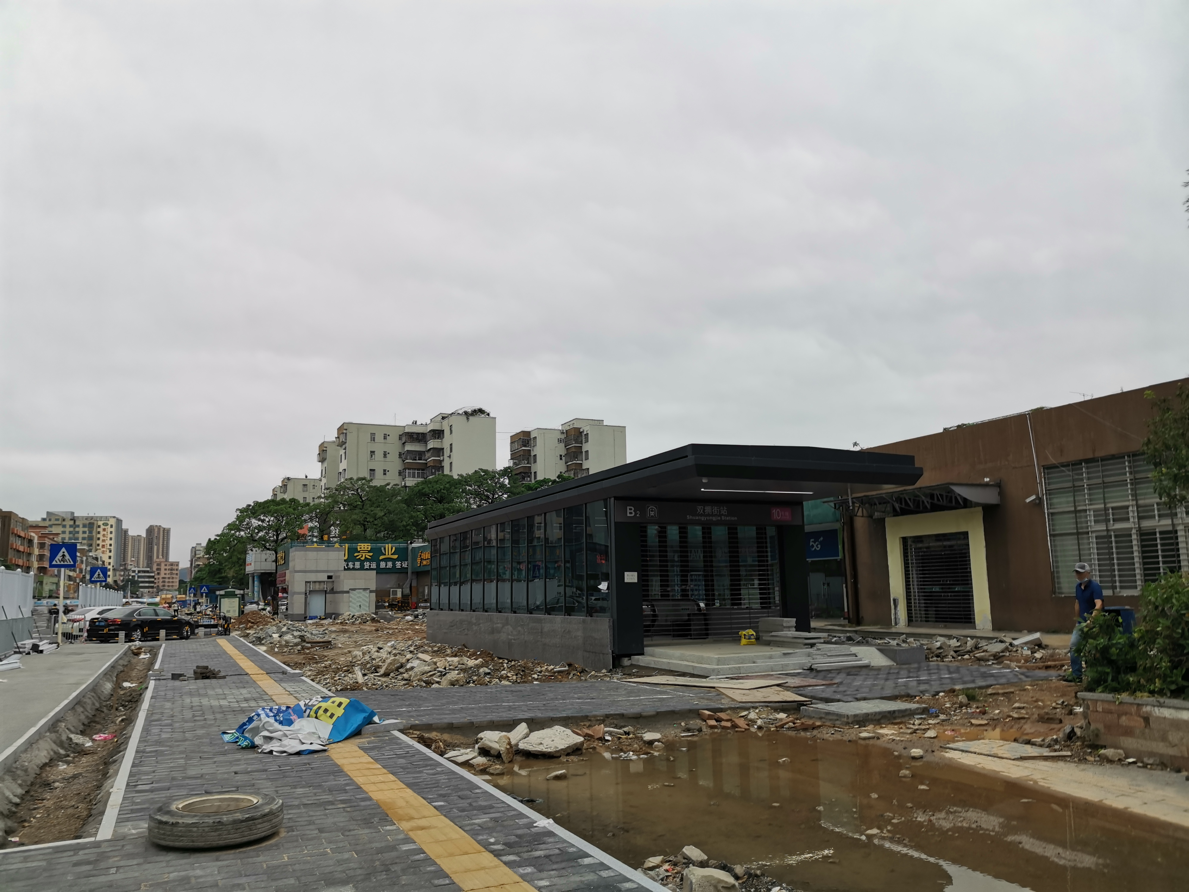 深圳地铁10号线双拥街站B2出口